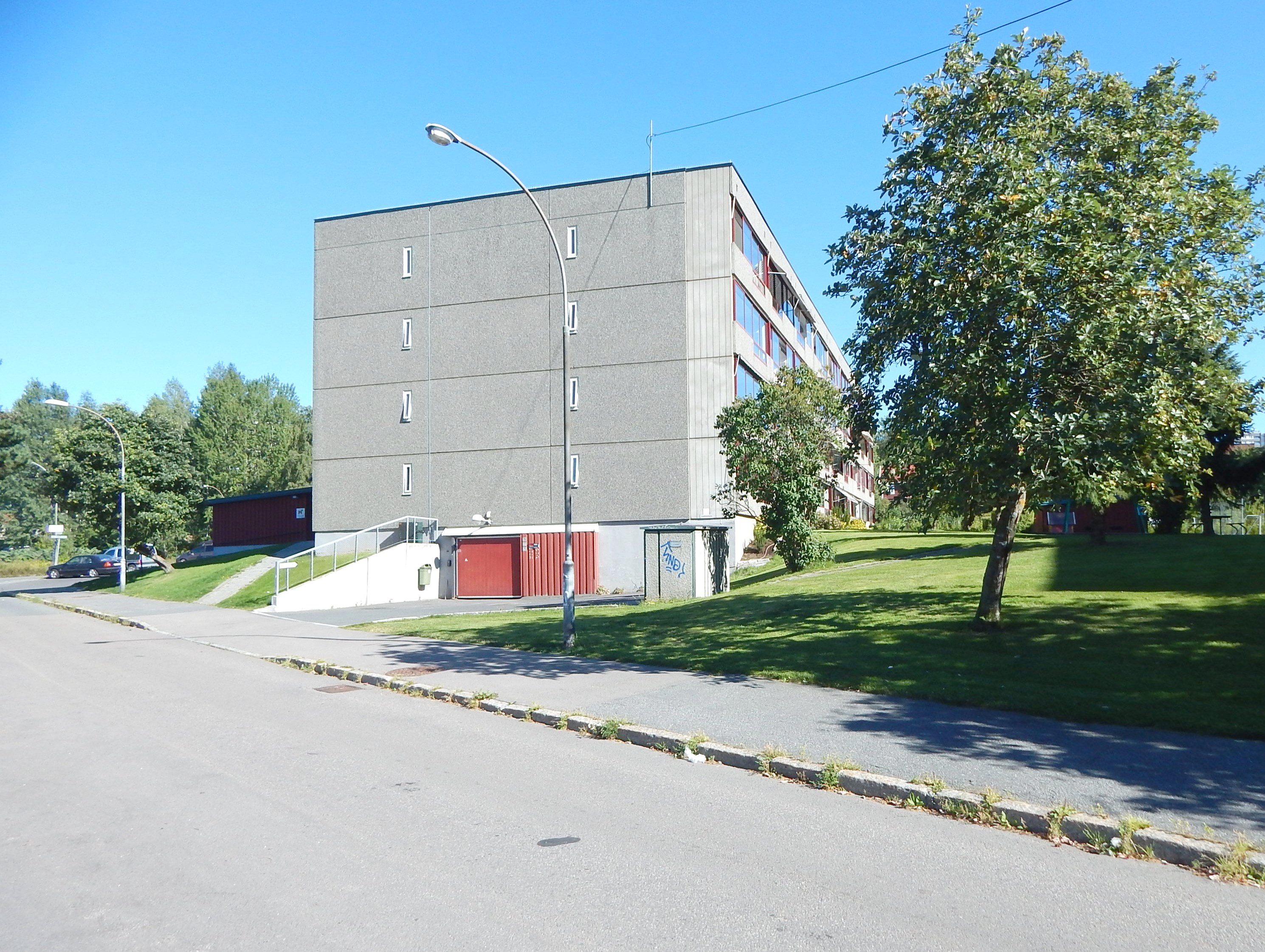 Hagapynten